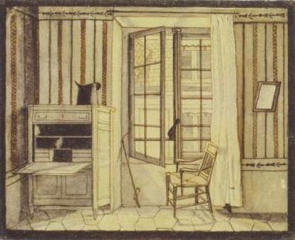 Ansicht 2 von 3 von Wilhelm Hauffs Zimmer im Kriegsministerium am Charlottenplatz in Stuttgart. Tuschezeichnung von Wilhelm Hauff, 1825. Wilhelm Hauff war 1824 bis 1826 bei dem Kriegsratspräsidenten Ernst von Hügel als Hofmeister angestellt und wohnte an der Rückseite des Kriegsministeriums gegenüber der Kanalstraße.